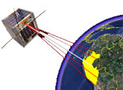 Chasqui 1